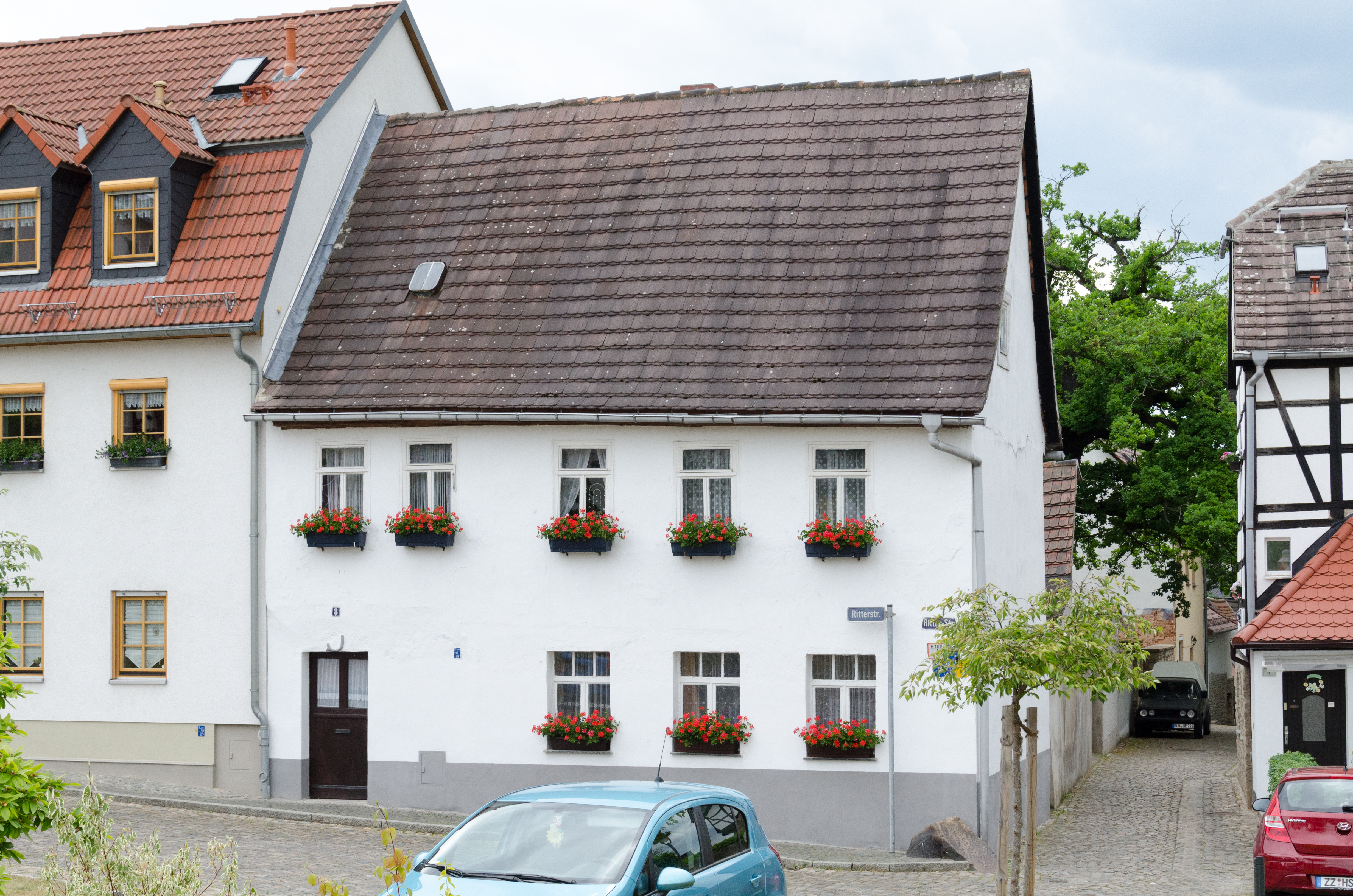 Zeitz, Ritterstraße 8